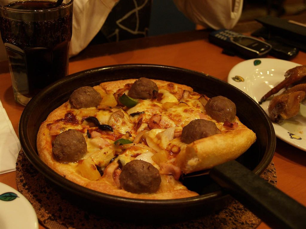 Une pizza Pan de Pizza Hut